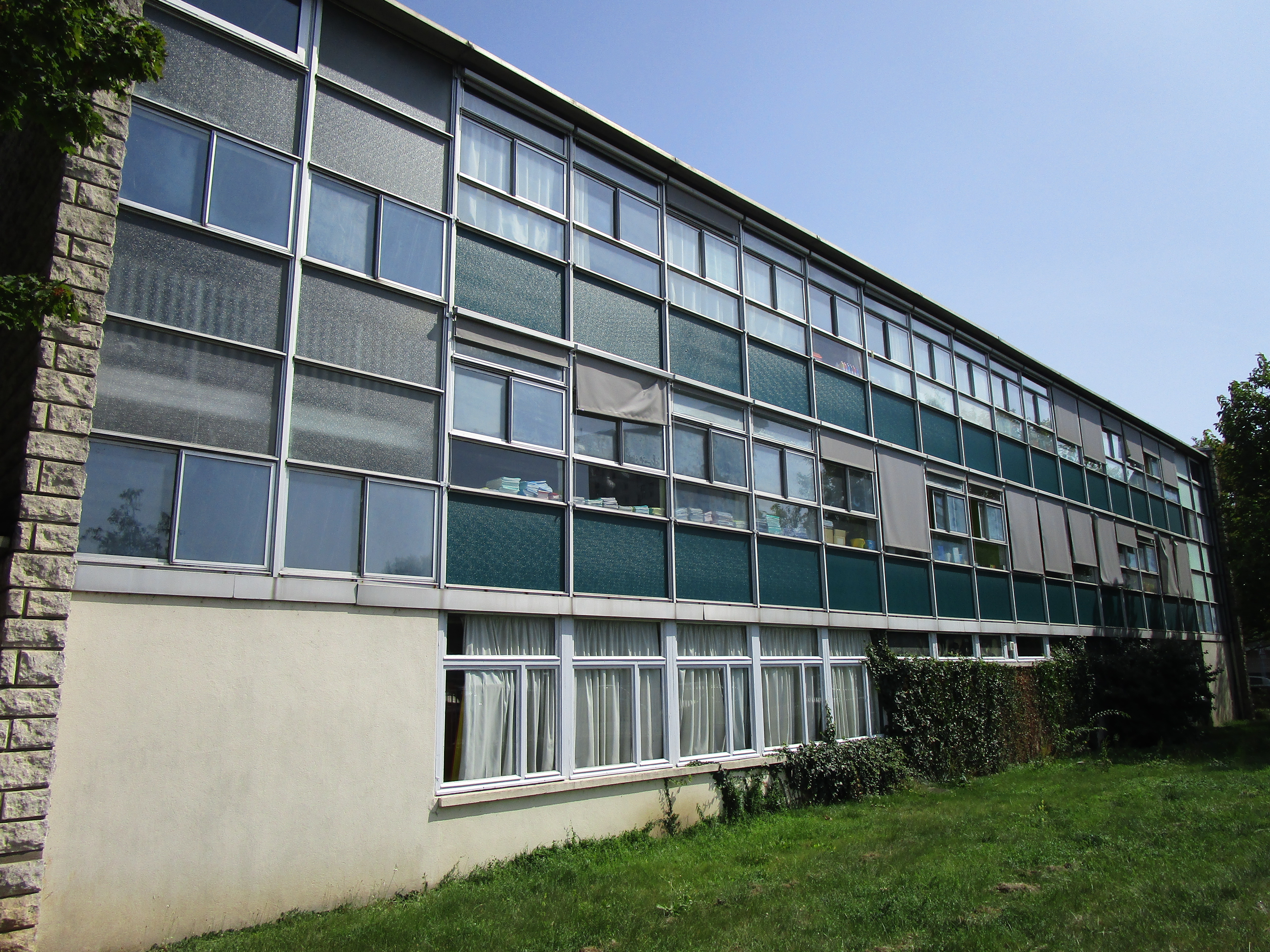 École élémentaire Maryse-Bastié, rue Michel Baugé, à Tours.